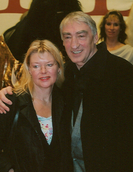 Gottfried John mit seiner Ehefrau bei der Deutschland-Premiere des Oliver Stone Films Alexander im Kölner Cinedom-Kino.